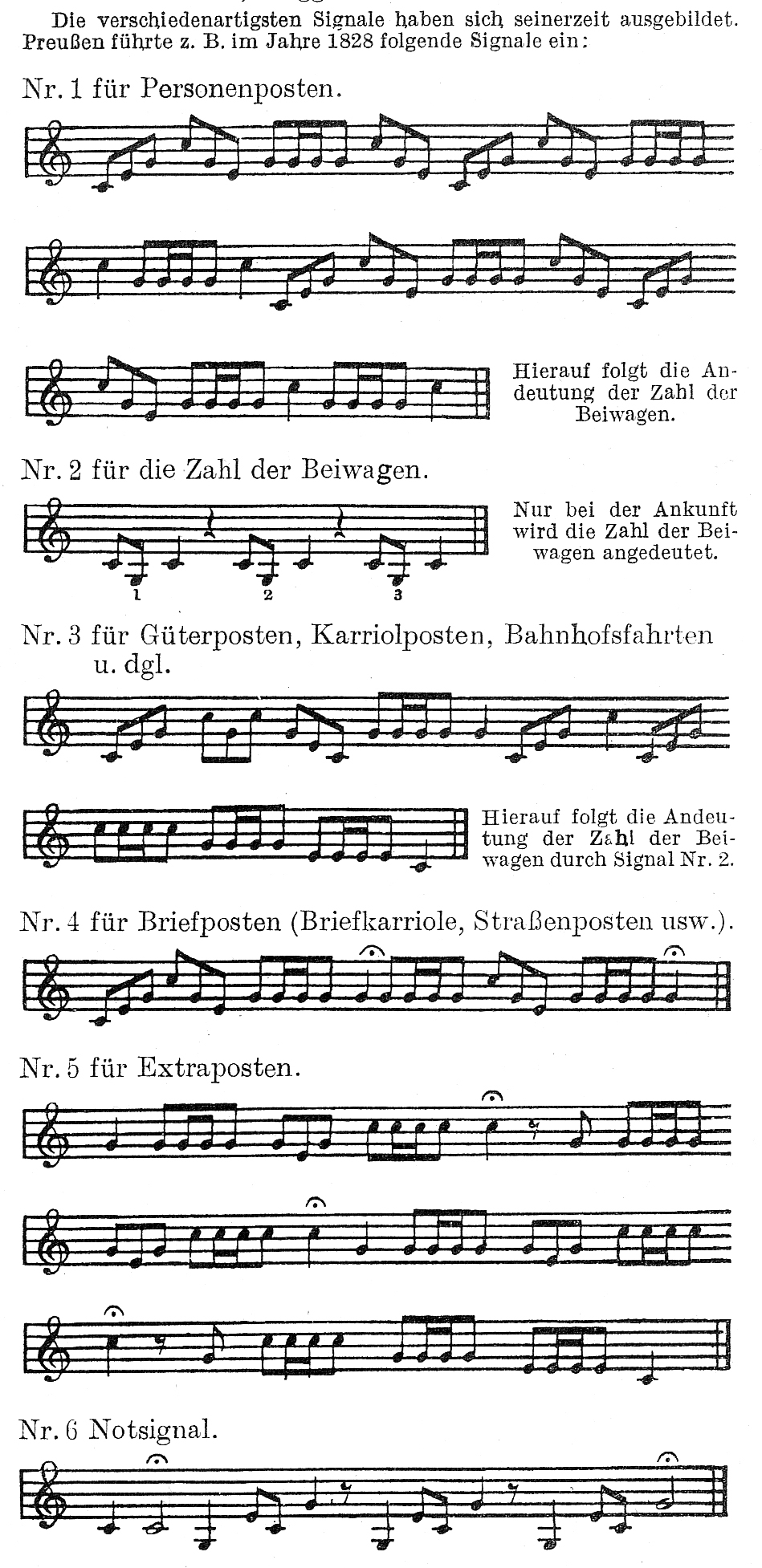 Posthornsignale in Noten